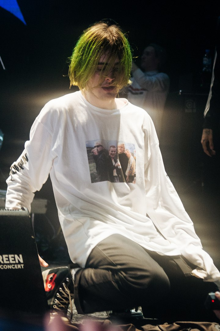 Концерт ПОШЛАЯ МОЛЛИ в Gluvclub green concert